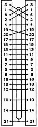 sposób połączenia złączy scart